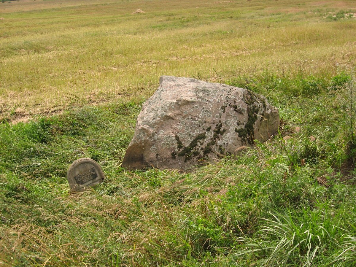 Смаленка. Смаленкаўскі вялікі камень.